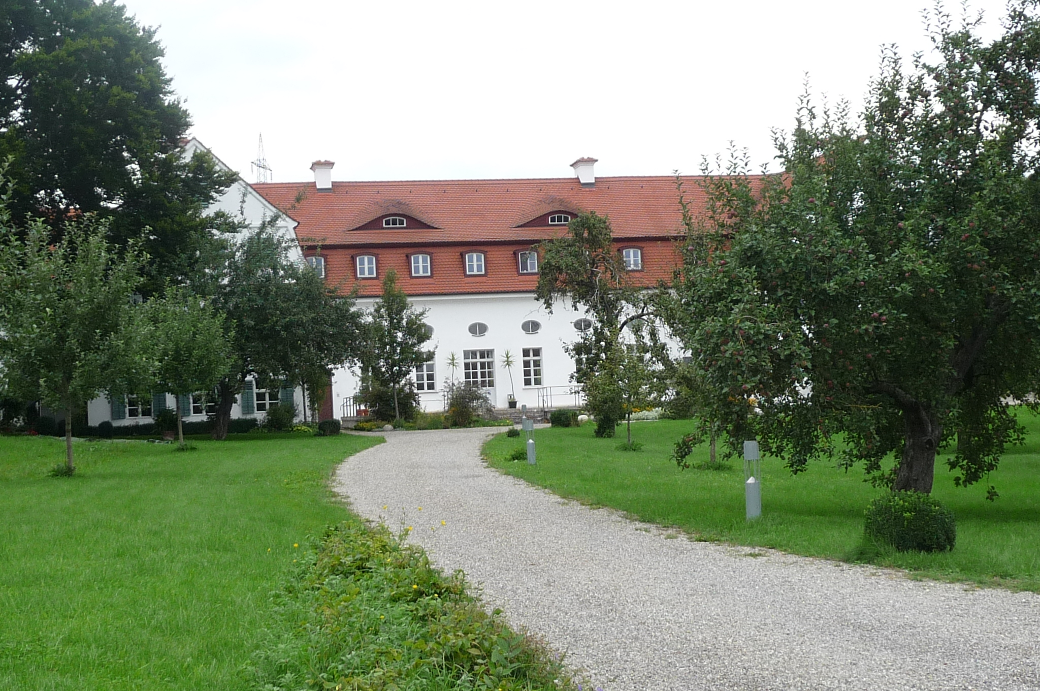 Das Schlößchen von Hesselohe bei Neuburg-Donau